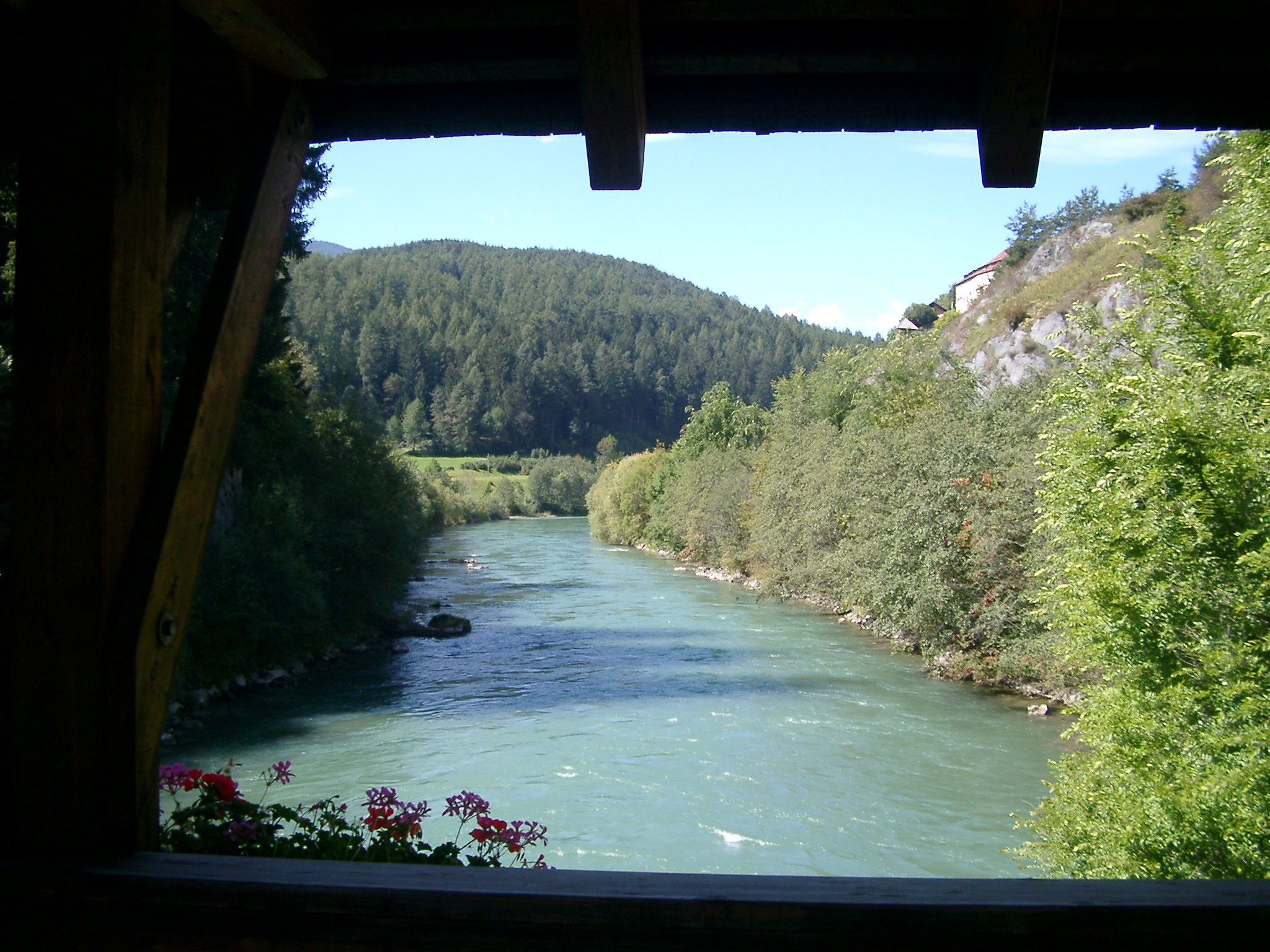 view on Rienz river near St. Lorenzen